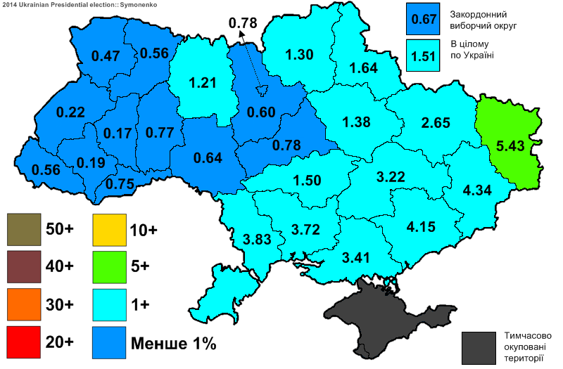 Електоральна підтримка Симоненка Петра Миколайовича на виборах Президента України 2014.